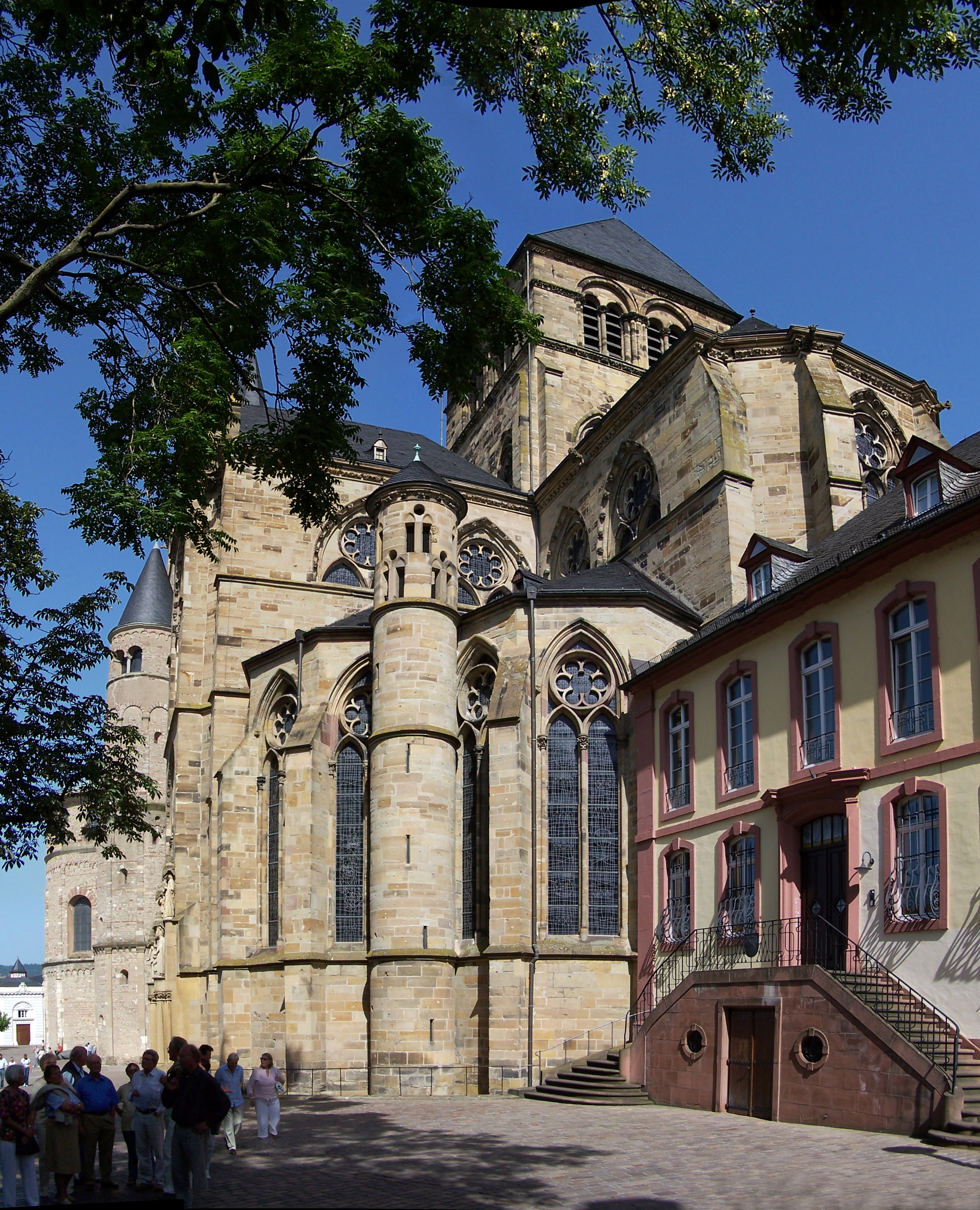 Liebfrauen Kirche in Trier